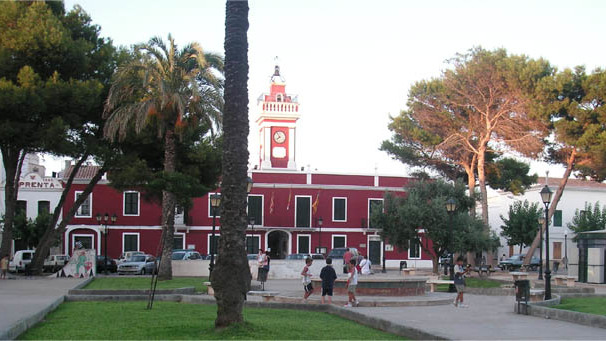 Plaza de la Explanada y Ayuntamiento de Es Castell, Menorca, Islas Baleares.